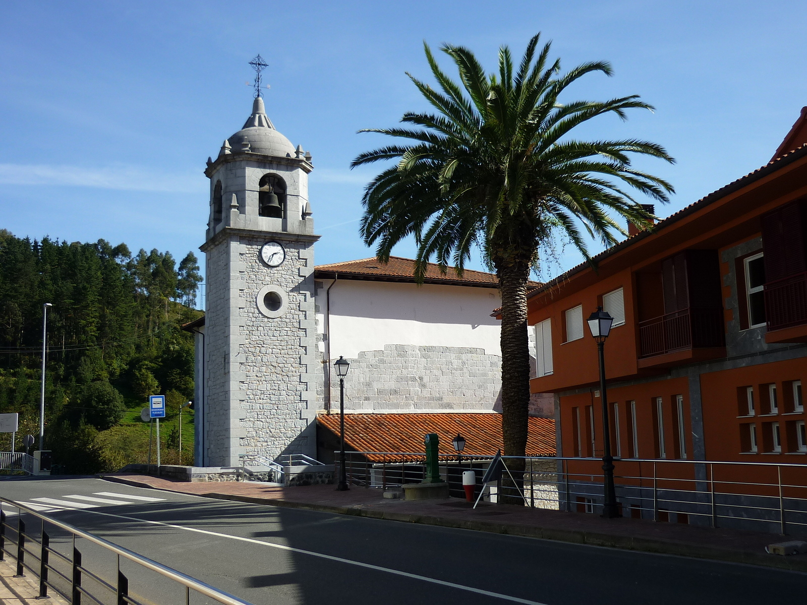 Bizkaiko Gizaburuagako eliza.